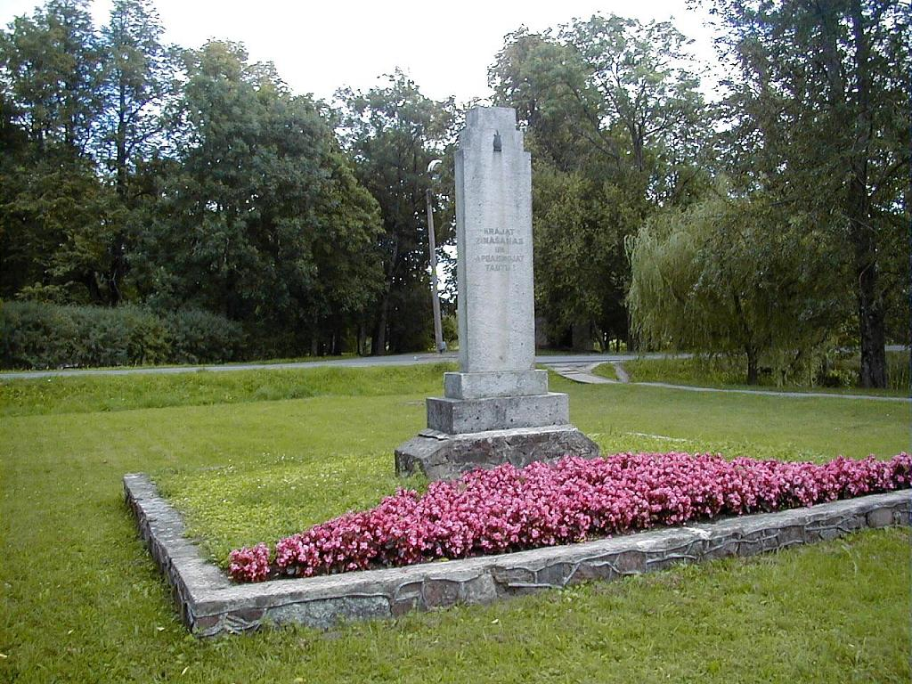 Dunalka, A. Spāģa piemineklis 2002-08-03